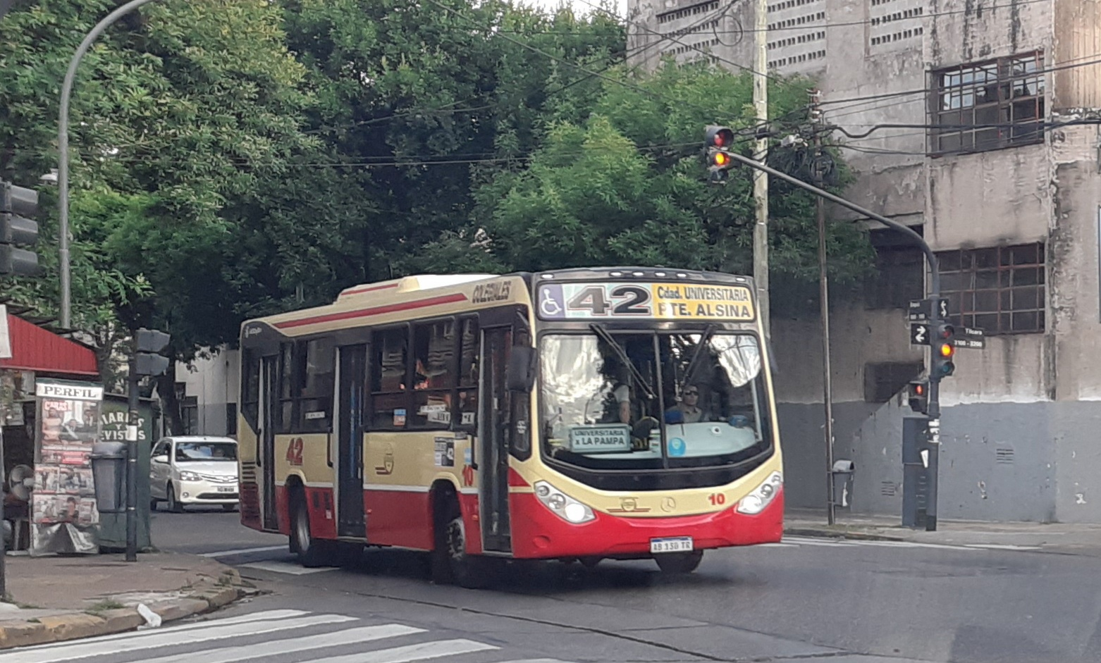 Línea 42 de colectivos de Buenos Aires